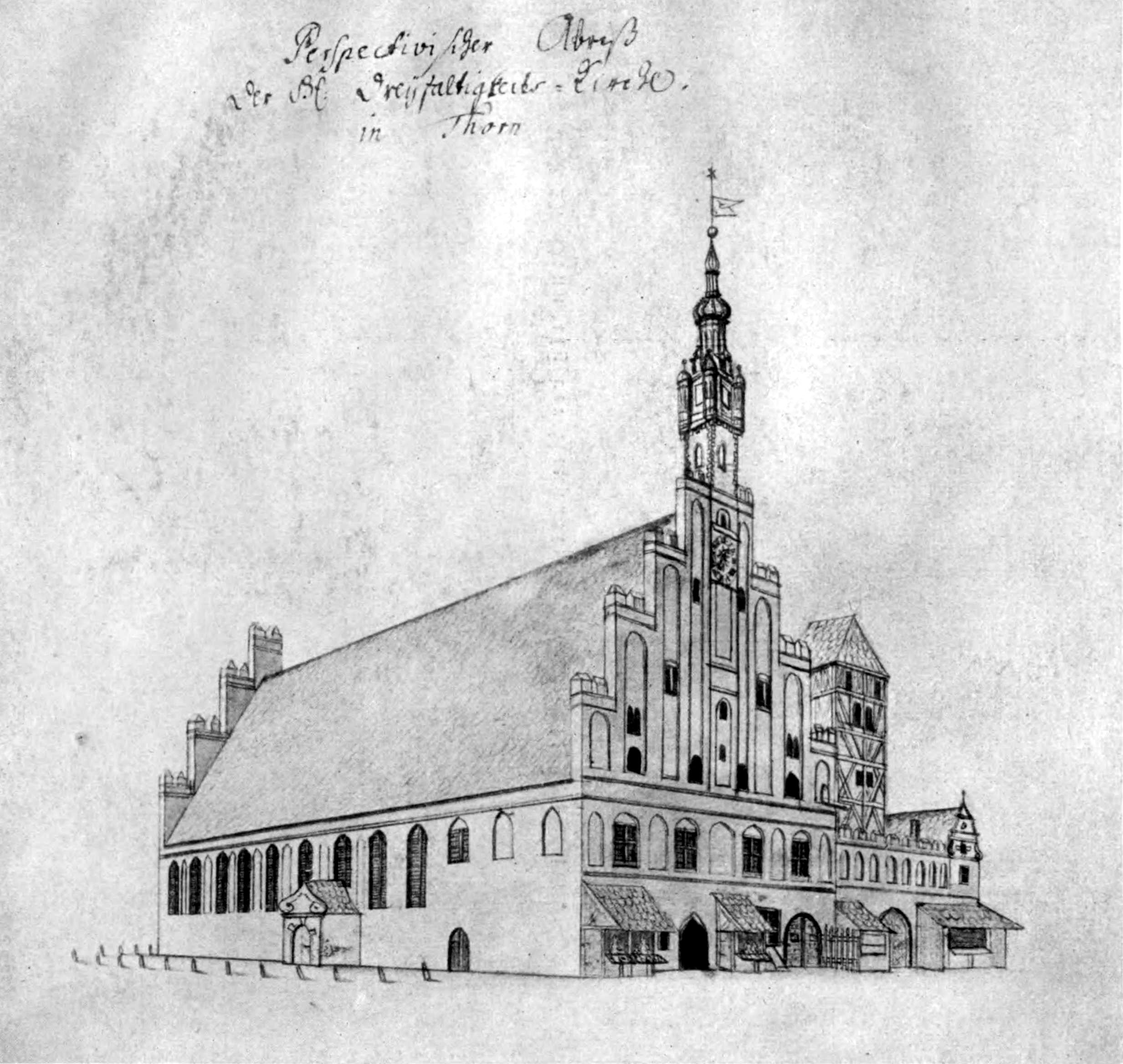 Ratusz Nowomiejski w Toruniu (późniejszy kościół ewangelicki pw. Trójcy Świętej) widziany od strony północnej